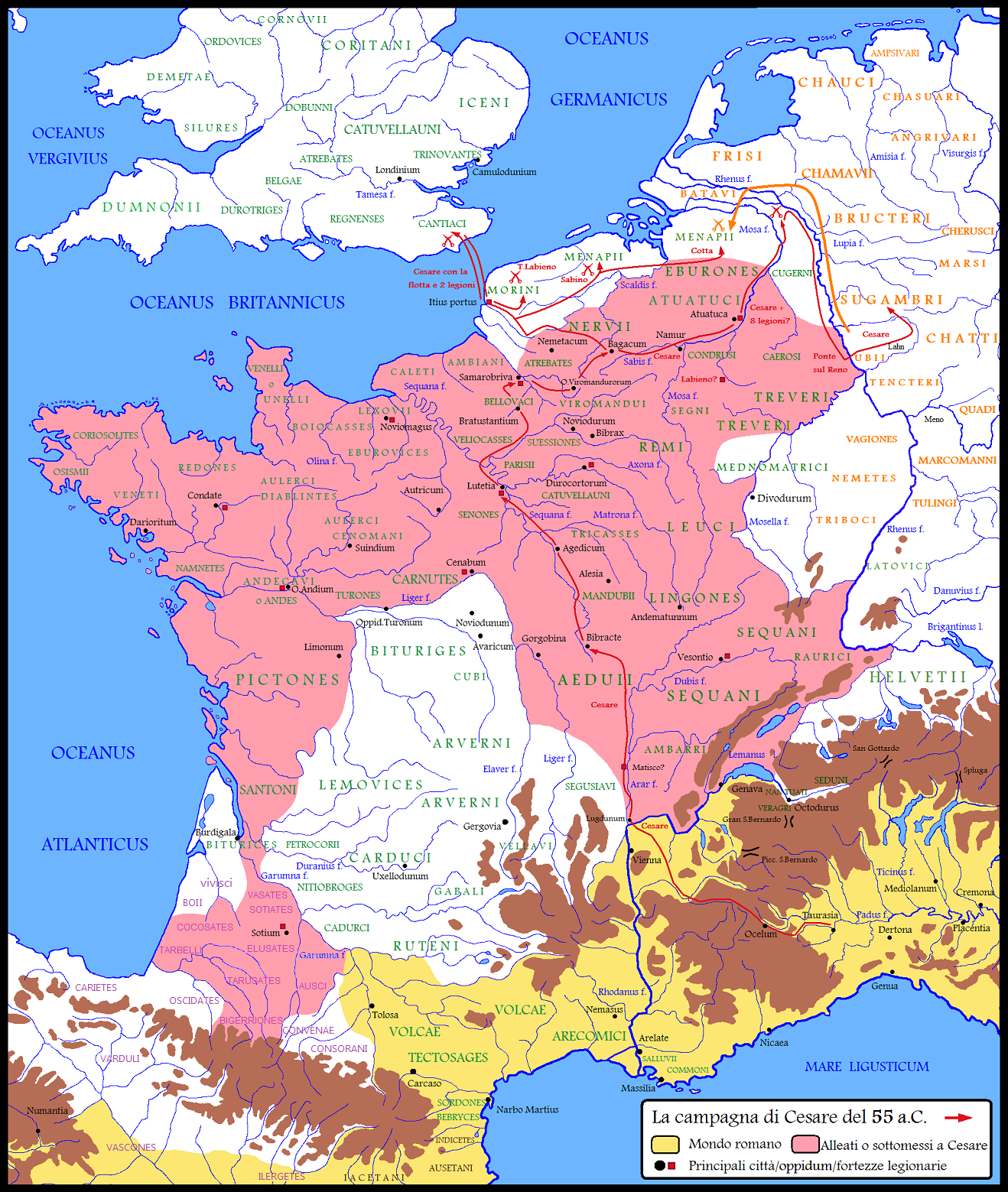 La Gallia nel corso del quarto anno di campagne militari di Cesare